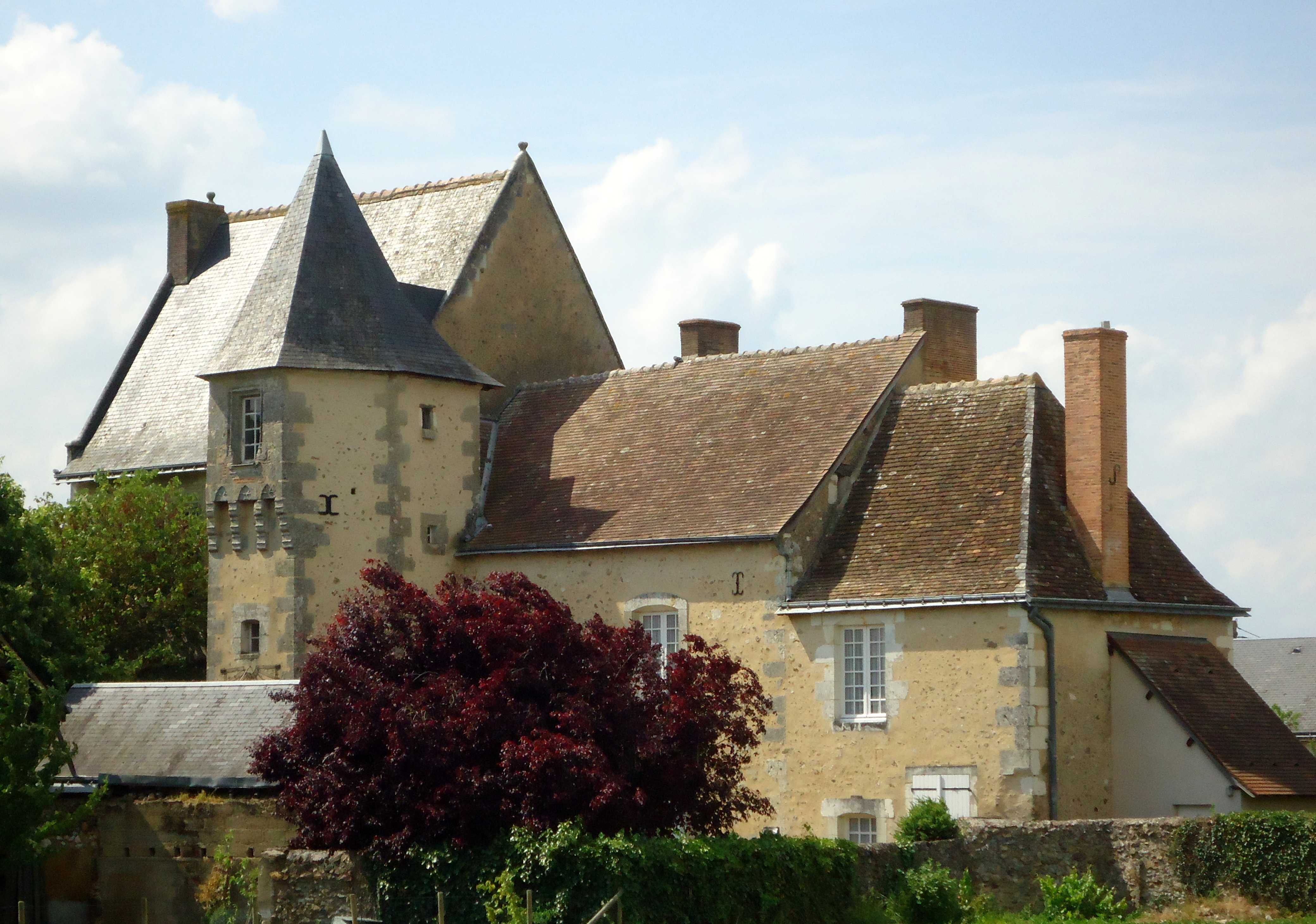 Presbytère - Saint-Pierre-de-Chevillé - Sarthe (72)